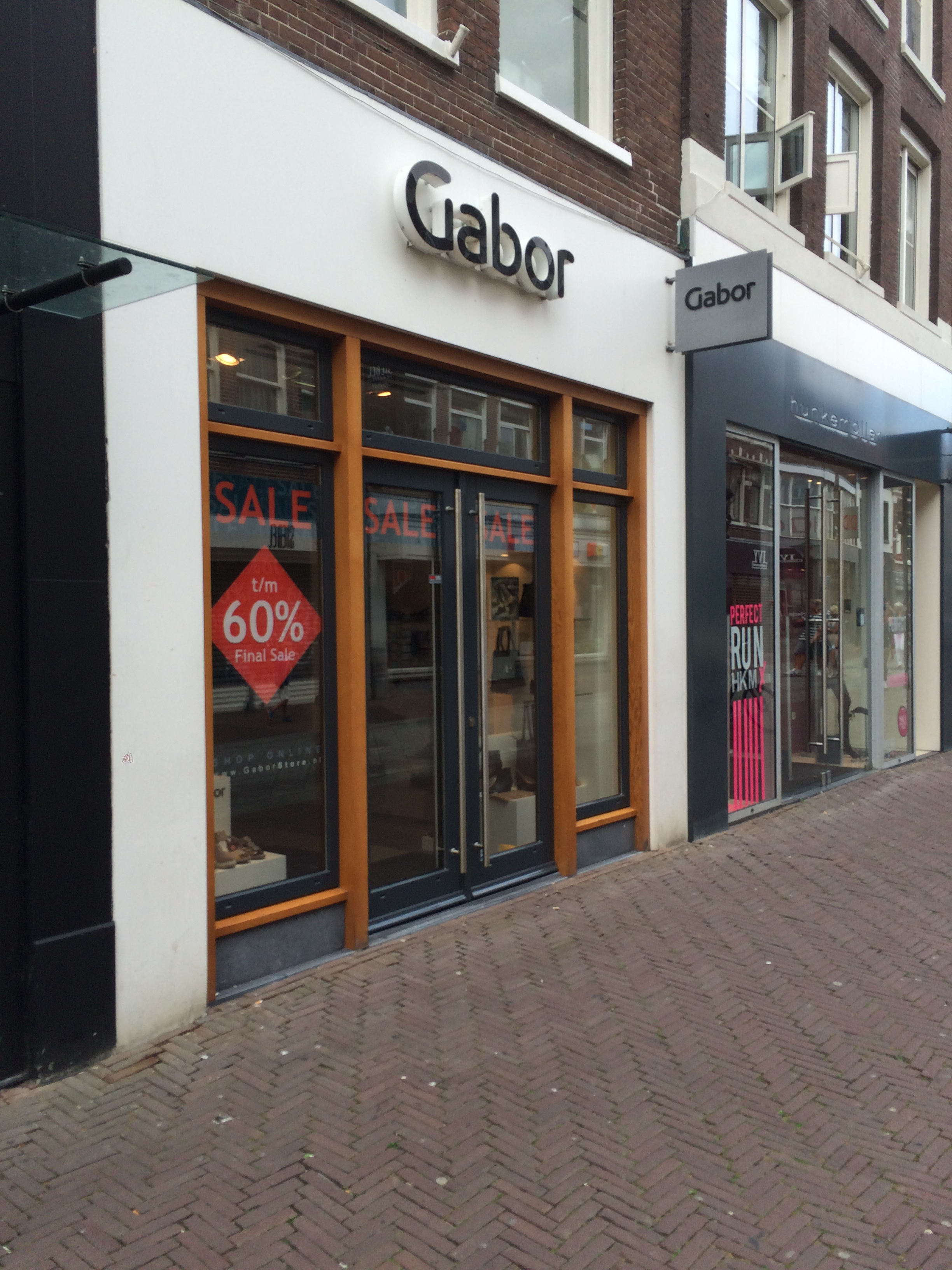 Strand Zugang Egmond aan Zee